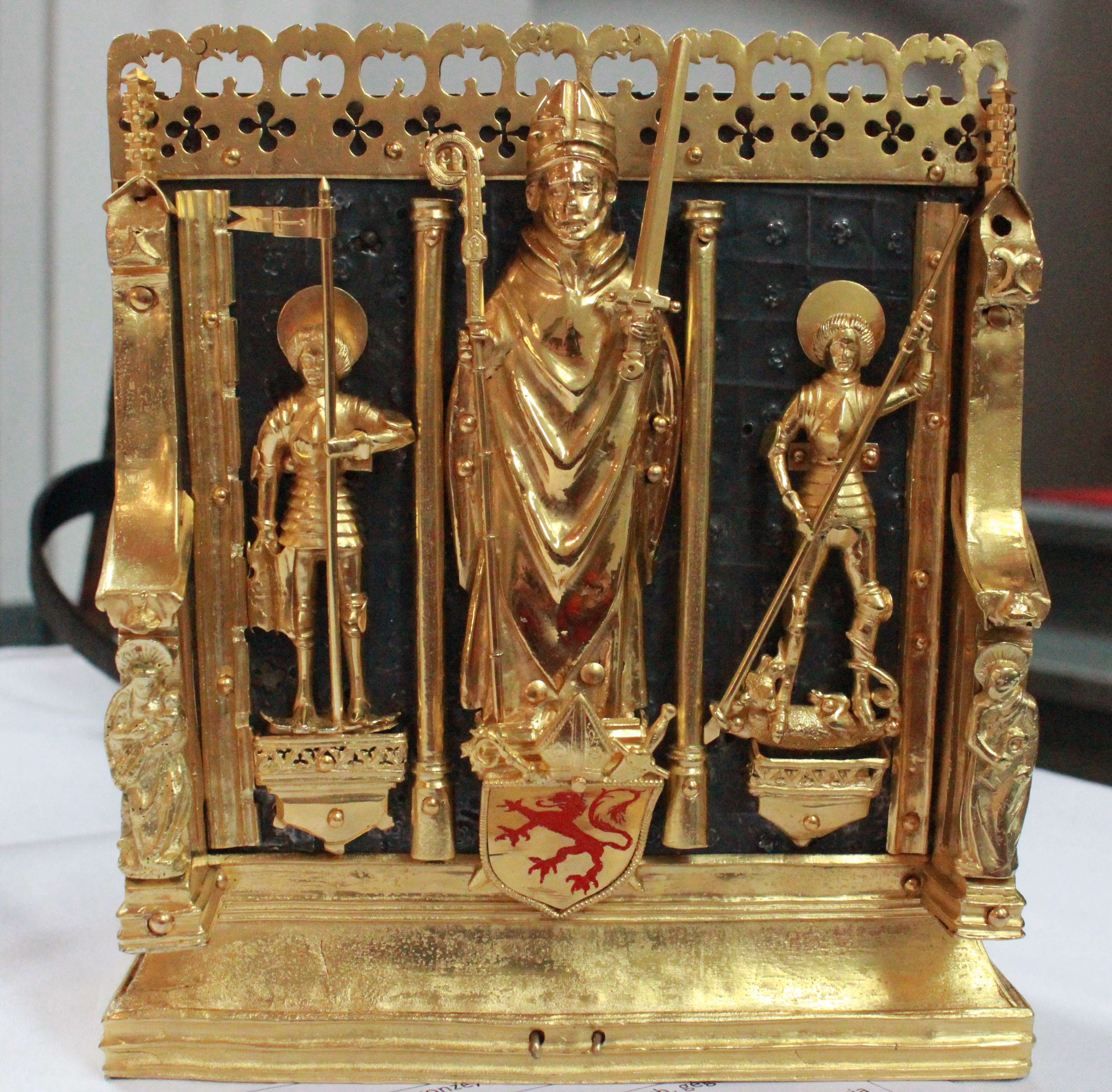 Reliquiar des Jost von Silenen, enstanden 1489, aus Bronze, mit dazugehörigem Futteral. Es gehört zu den Kulturgütern der Pfarrkirche in Küssnacht SZ.